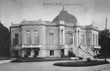 Vista del salón de patinaje sobre hielo "Palais de Glace" desde la Avenida Alvear (hoy Avenida del Libertador). Actualmente Palacio Nacional de Exposiciones. Buenos Aires, Argentina.